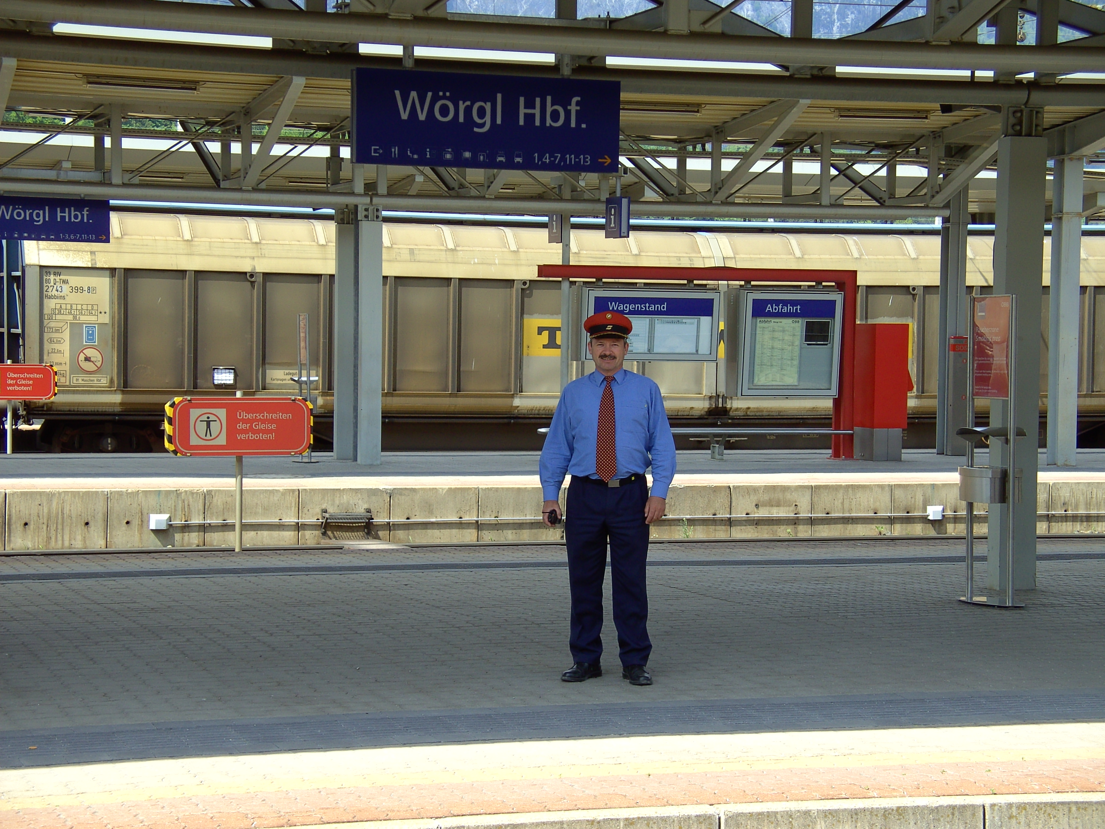 Wörgl Hbf - Bahnsteige mit Fahrdienstleiter, im Hintergrund Güterwaggon 33 80 2743 399-8